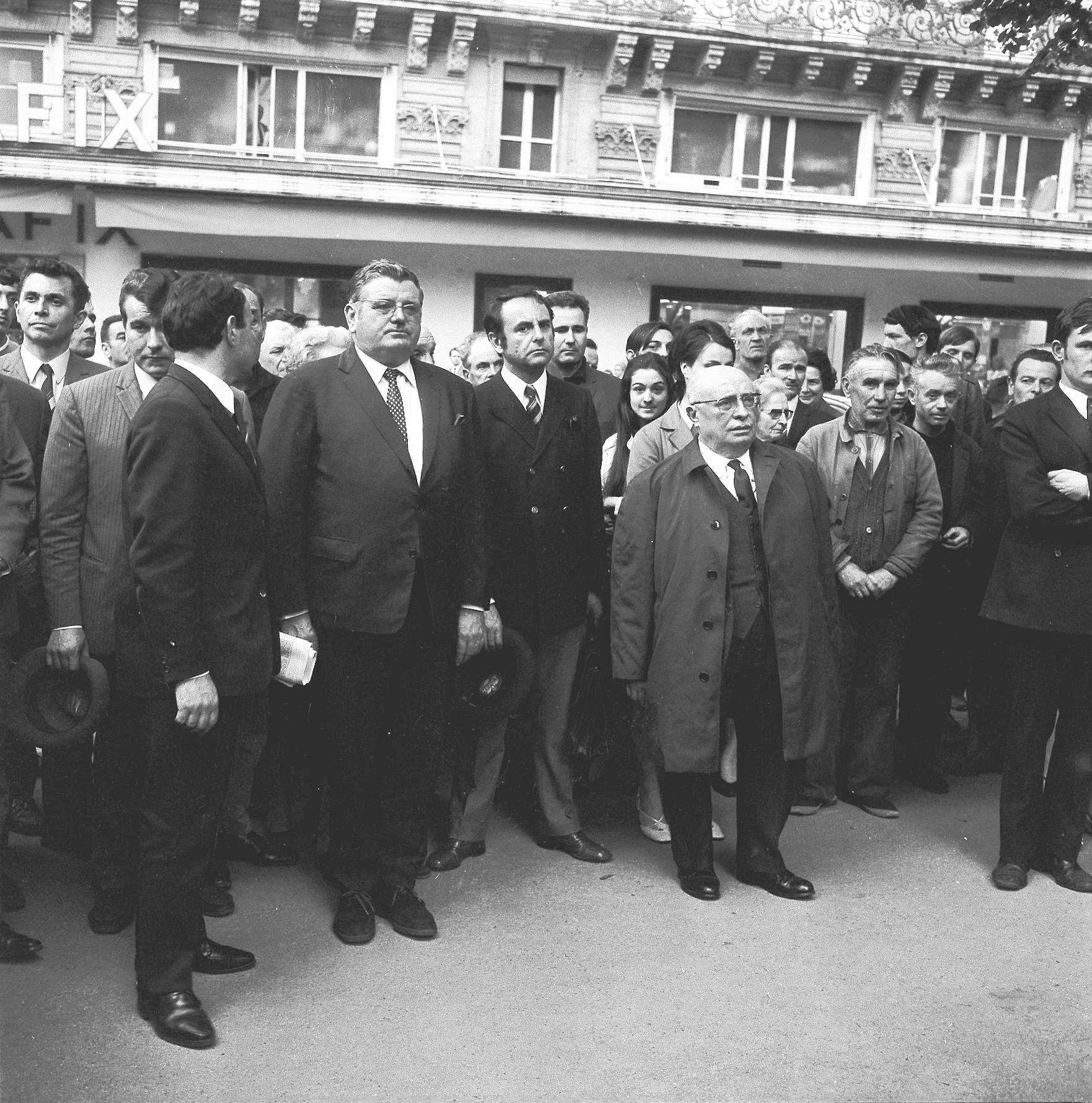 Square Charles-de-Gaulle. 23 mai 1969. Vue de messieurs Jacques Duclos, sénateur communiste, candidat à l'élection présidentielle et Jean-Baptiste Doumeng, maire communiste de Noé (Haute-Garonne), lors d'un dépôt de gerbe devant la statue de Jean Jaurès, à l'occasion de la campagne des élections présidentielles.